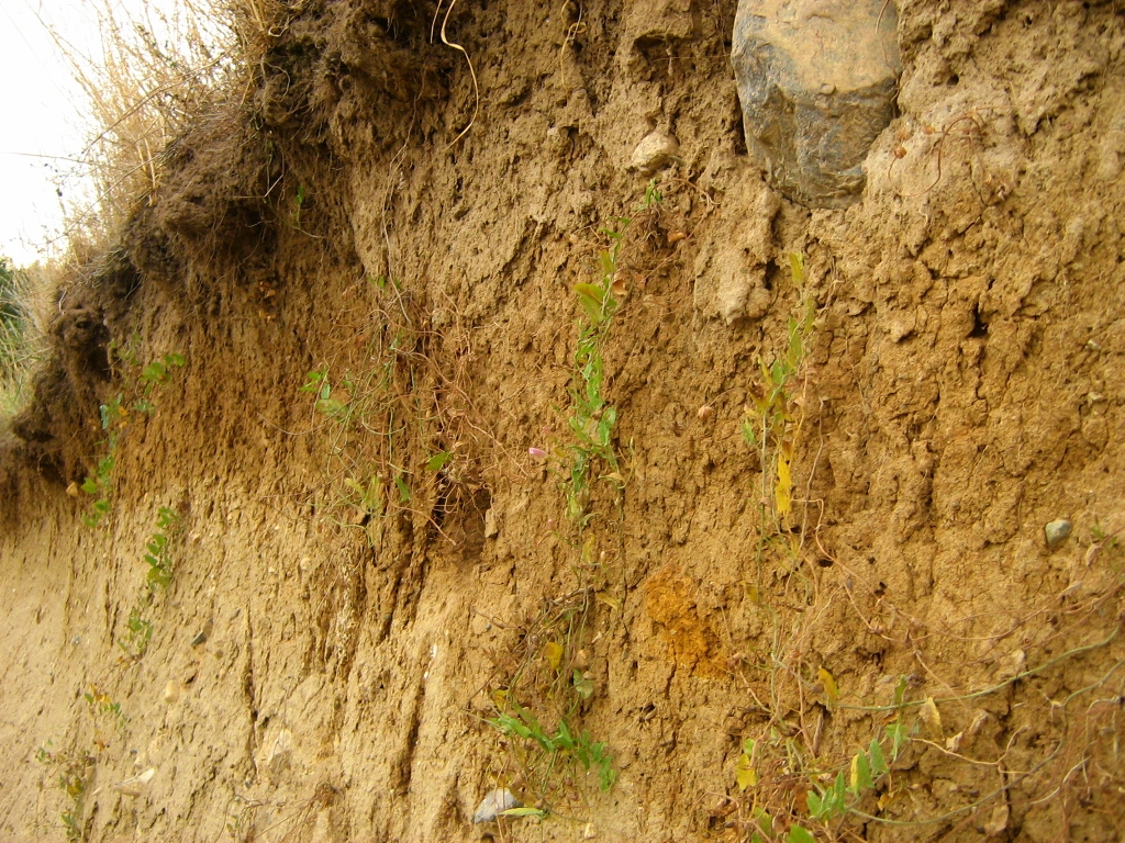 Eiszeitlicher Geschiebemergel der Jungmoränenlandschaft am nördlichen Talhang (Flussterrasse) der Recknitz in Mecklenburg-Vorpommern, Anschnitt in einer aufgelassenen Mergelgrube. Die Verbraunung im oberen Teil des Profils ist auf bodenbildende Prozesse zurückzuführen.